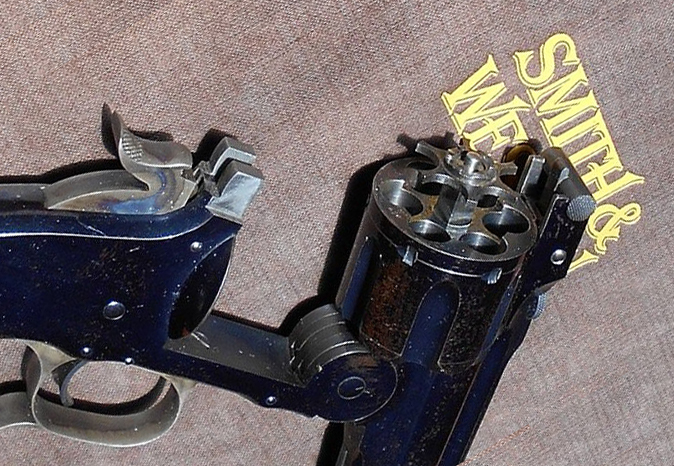 S&W Auswerfer